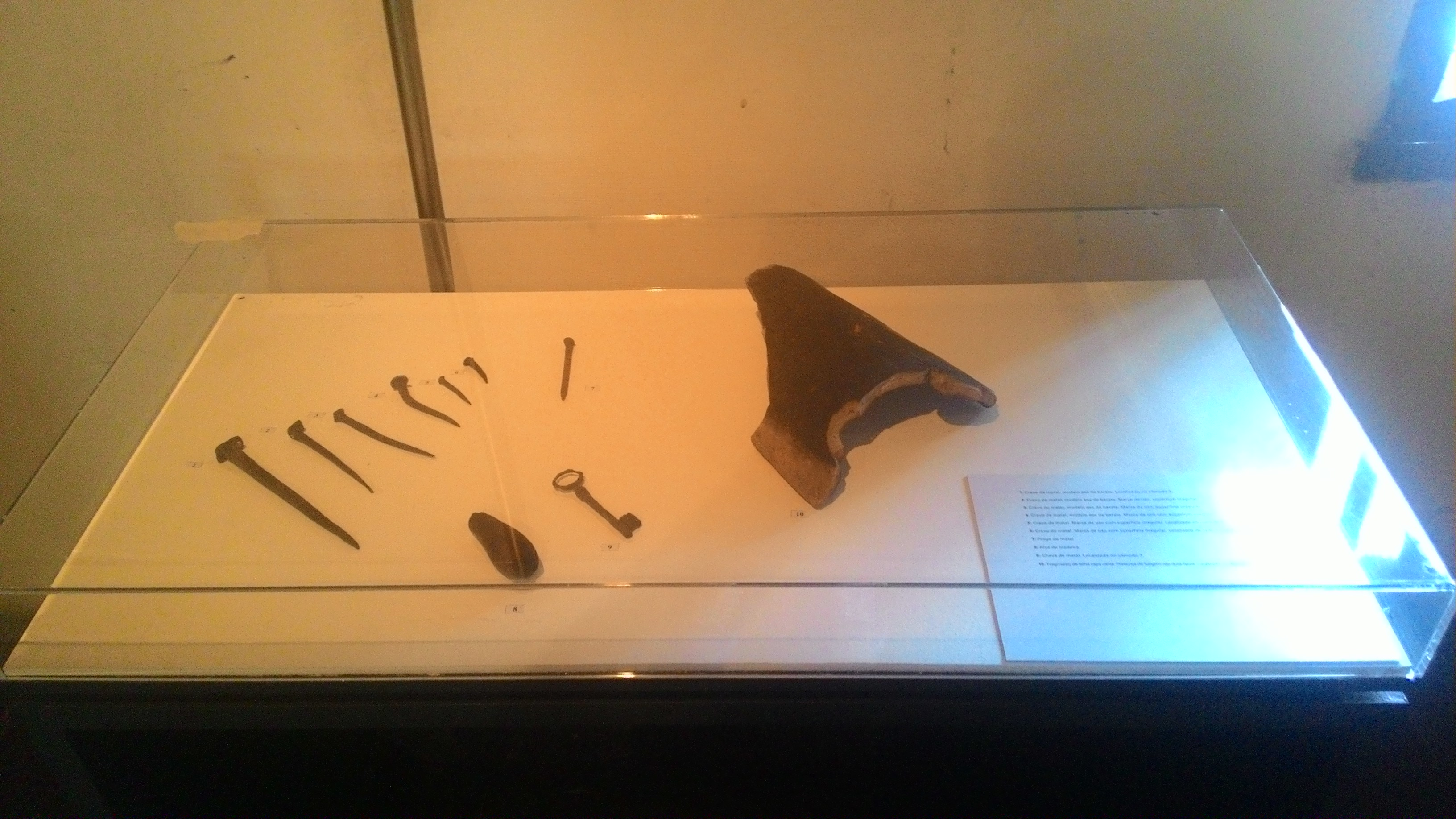 Exposição de utensílios usados na Casa do Sítio Tatuapé, em São Paulo (SP), Brasil.